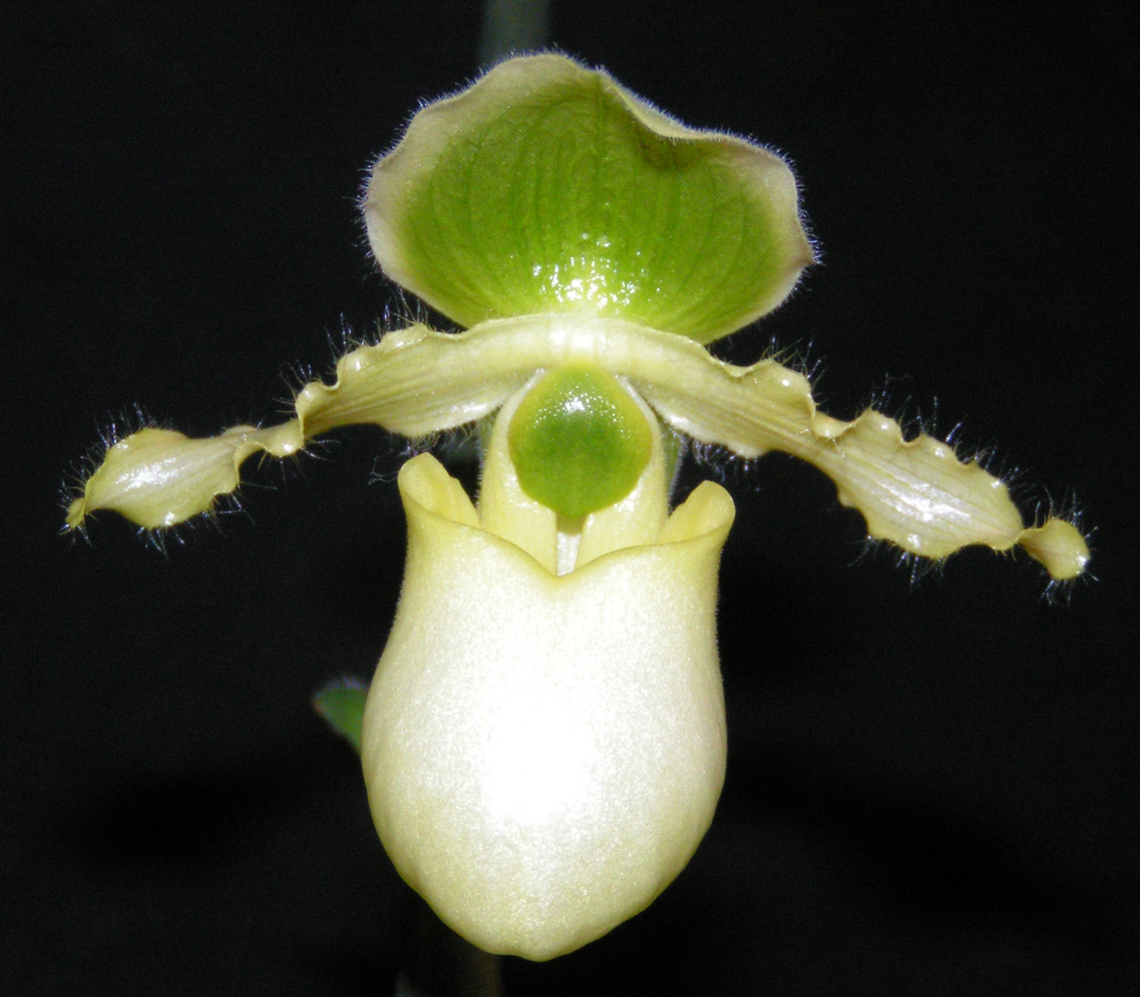 Paphiopedilum primulinum - flos